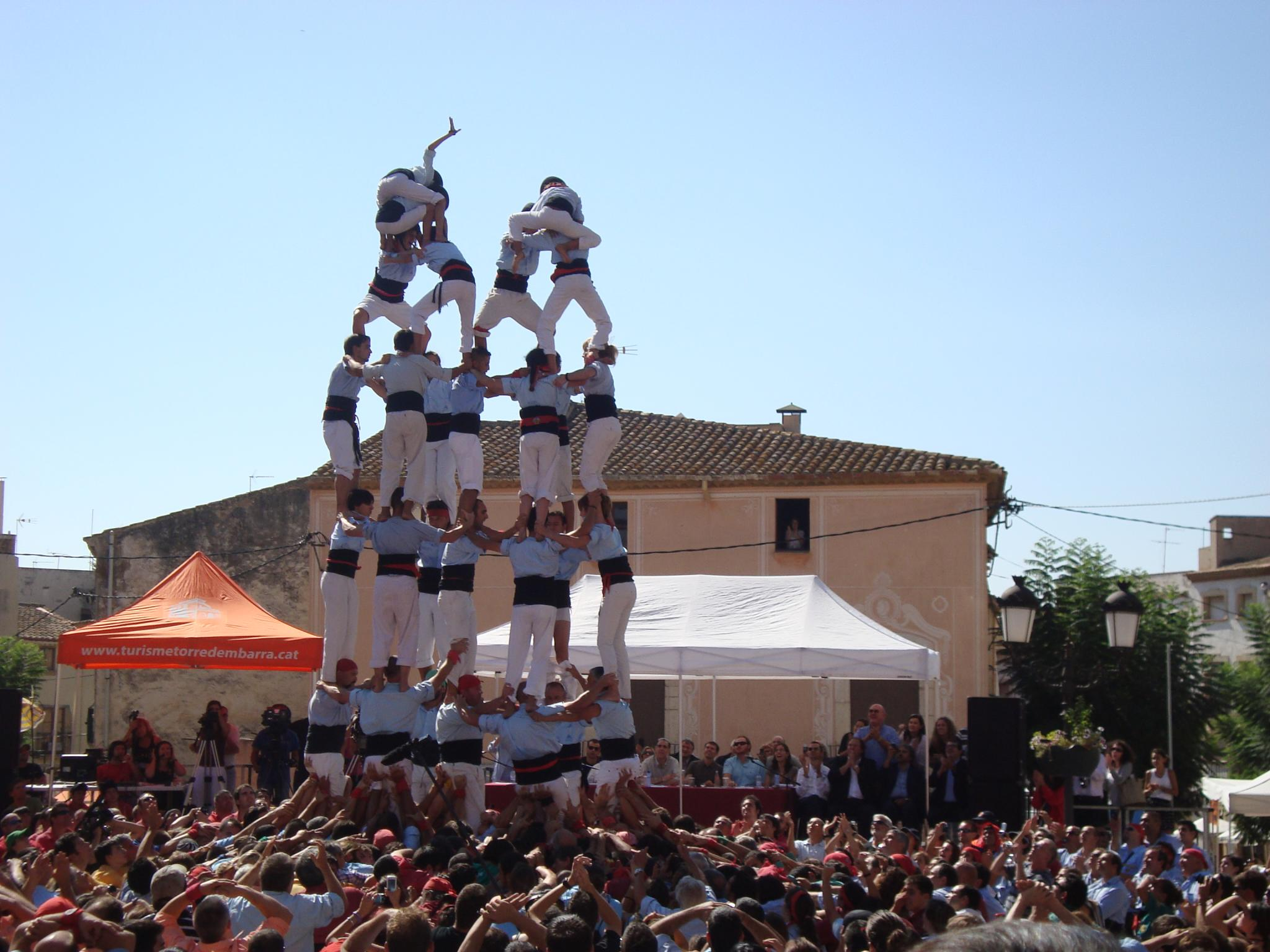 7de7 dels Nois de la Torre, al Concur7 2011